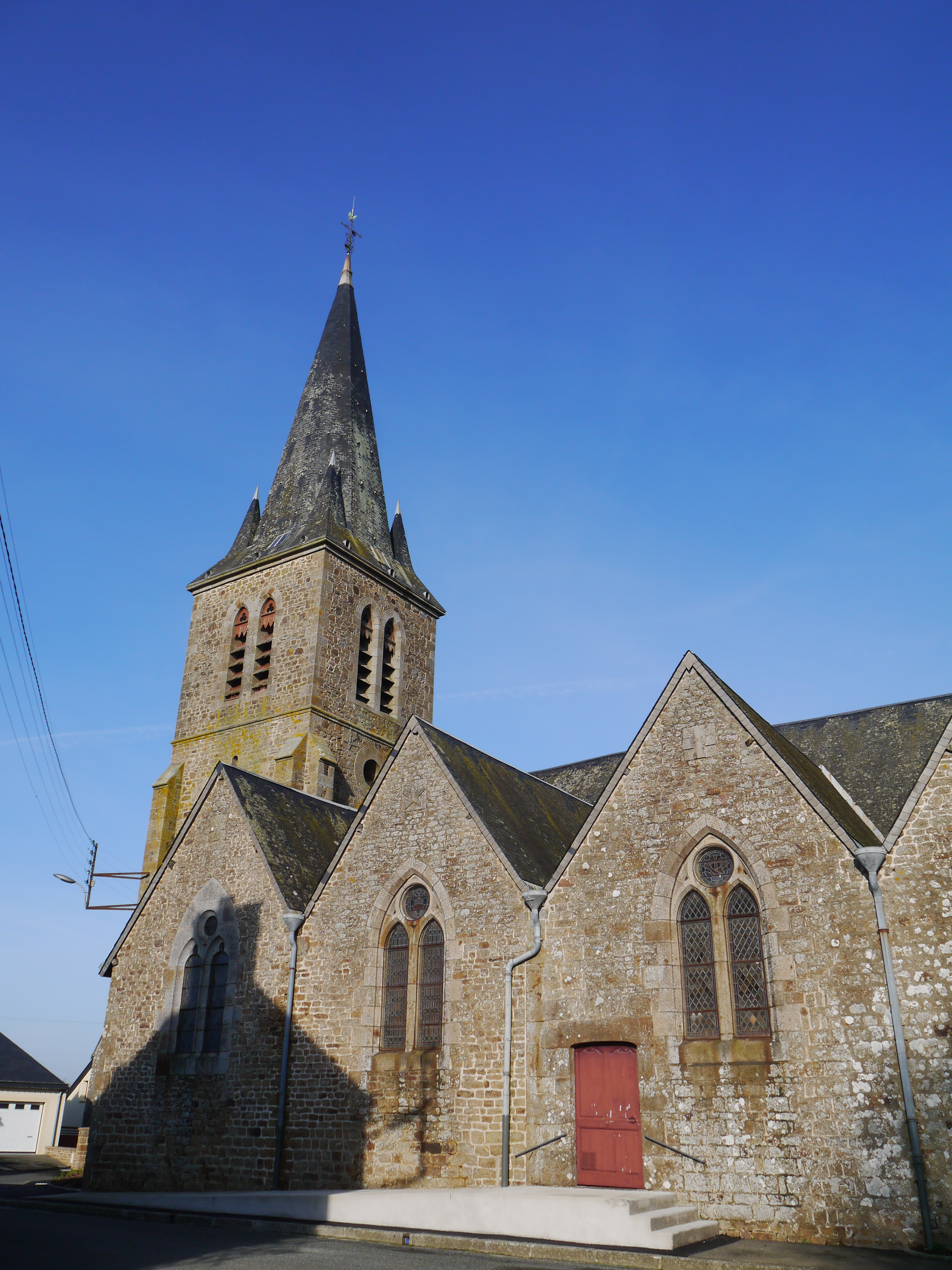 L'église.